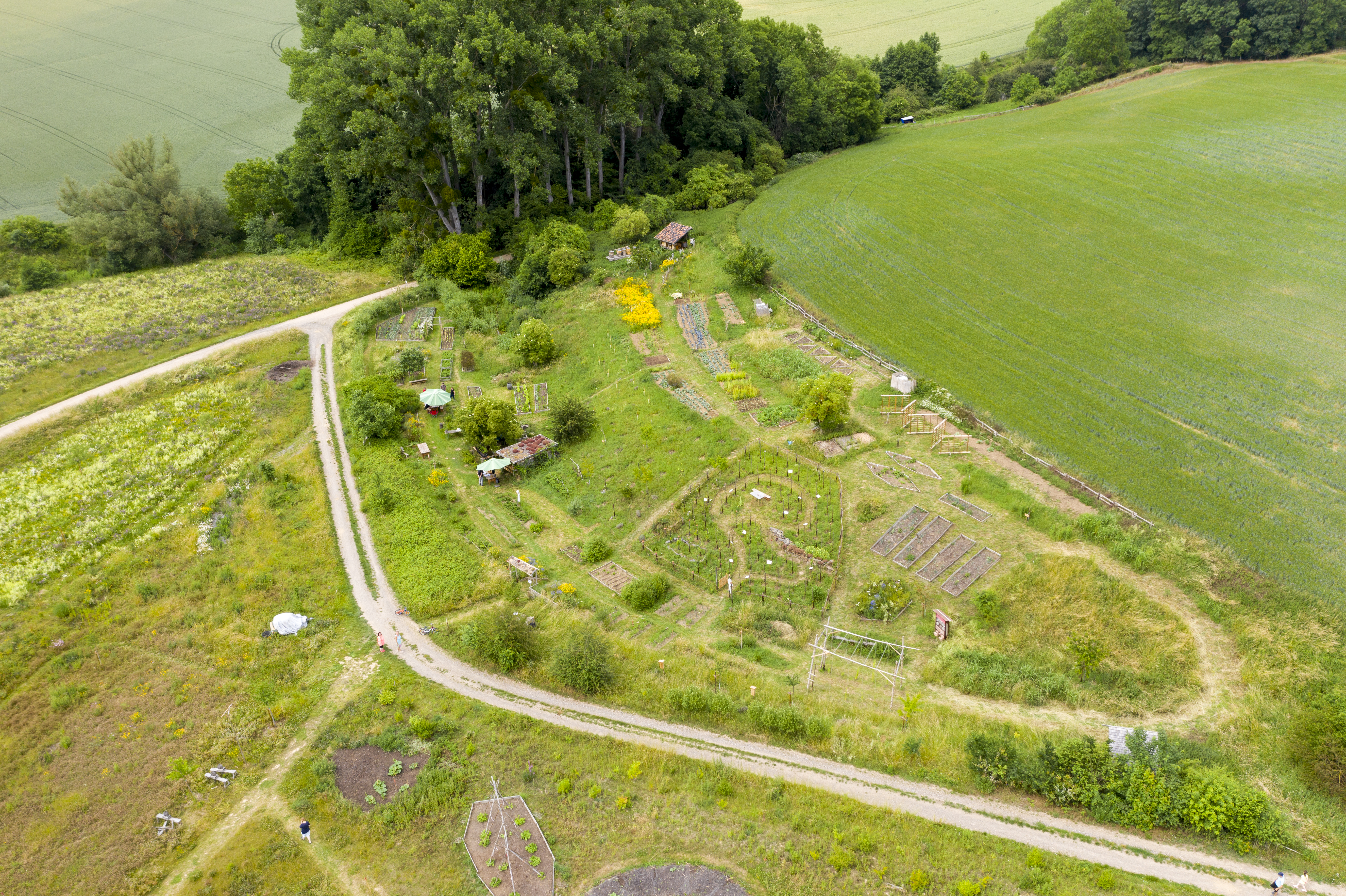 Übersicht des Gartenbereichs